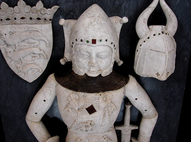 Junker Christoffer (død 1363, detalje af alabast), søn af Valdemar Atterdag og Helvig af Slesvig, Roskilde Domkirke, Sjælland